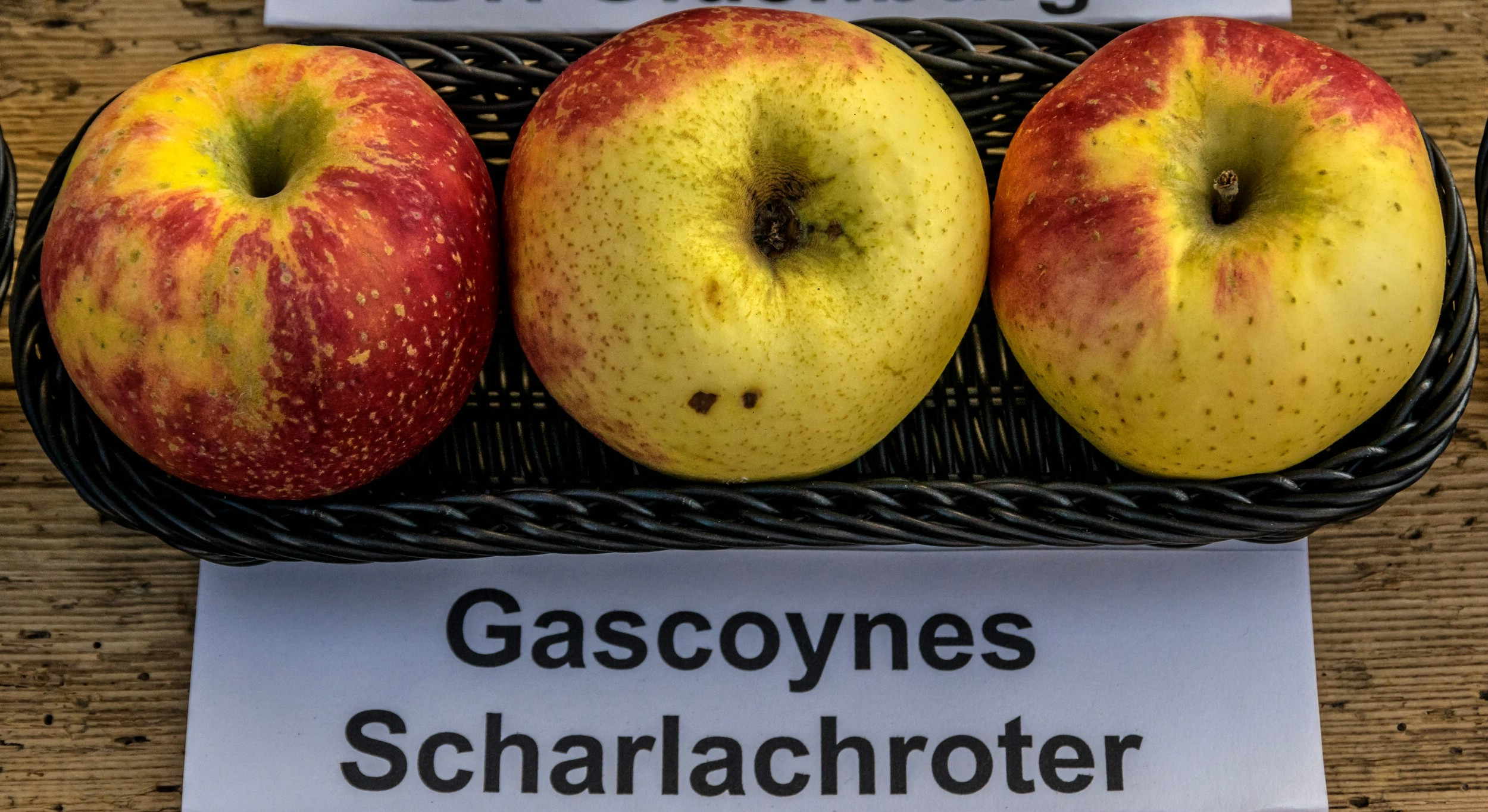 Alte Apfelsorten, von denen es im Badischen noch tragende Bäume gibt. Alle Aufnahmen au dem Oktober 2015